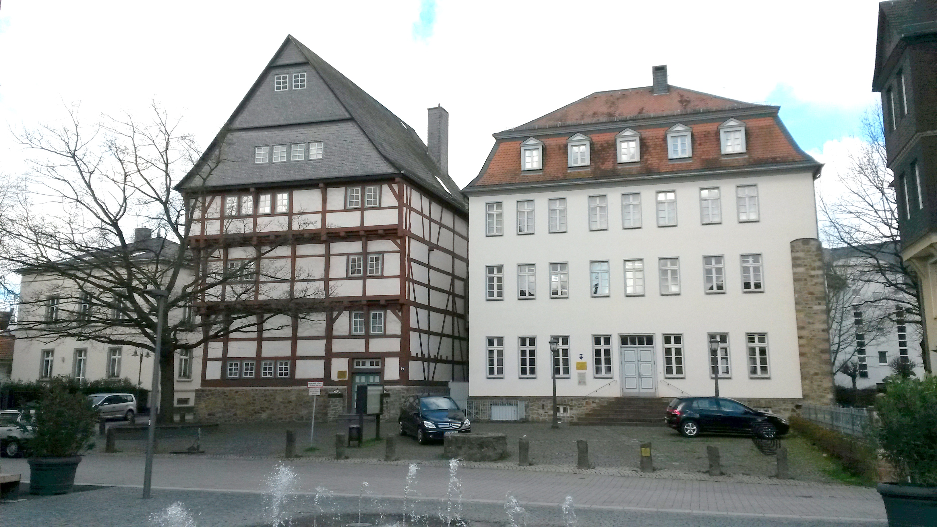 Leib'sches Haus und Wallenfels'sches Haus am Kirchenplatz in Gießen, Hessen